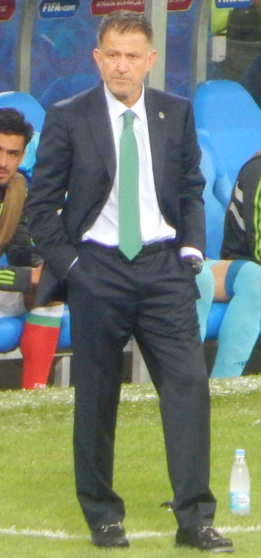 Тренер мексиканцев колумбиец Хуан Карлос Осорио